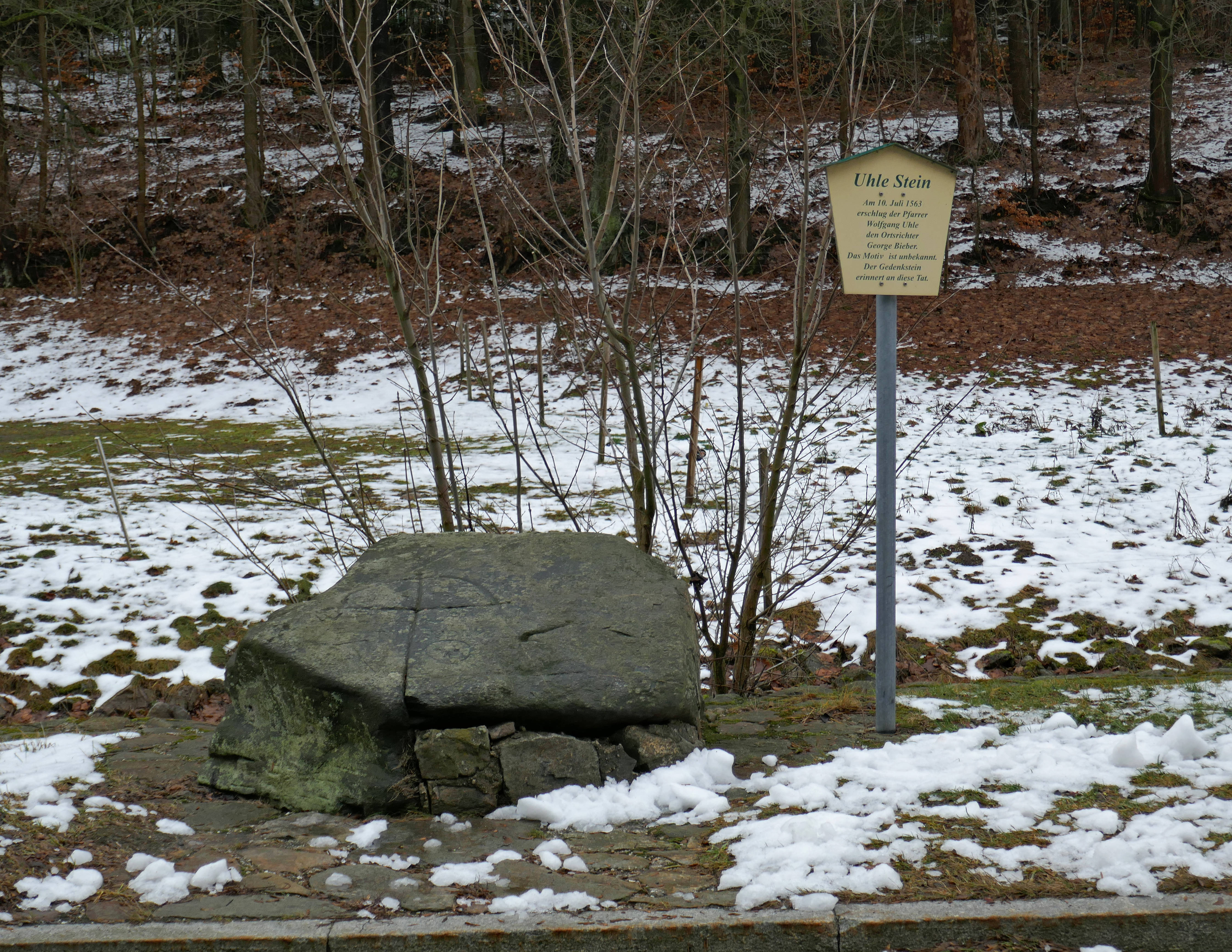 Uhle-Stein in Clausnitz, bei Dorfstraße 13 - Rechenberg-Bienenmühle, Landkreis Mittelsachsen.